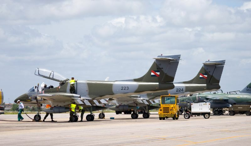 Operação Cruzex IV 2008 da Aeronática Brasileira na Base Aérea de Natal em Natal, Rio Grande do Norte, Brasil.